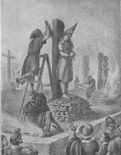 Caption: Execution of Mariana de Carabajal at Mexico, 1601.